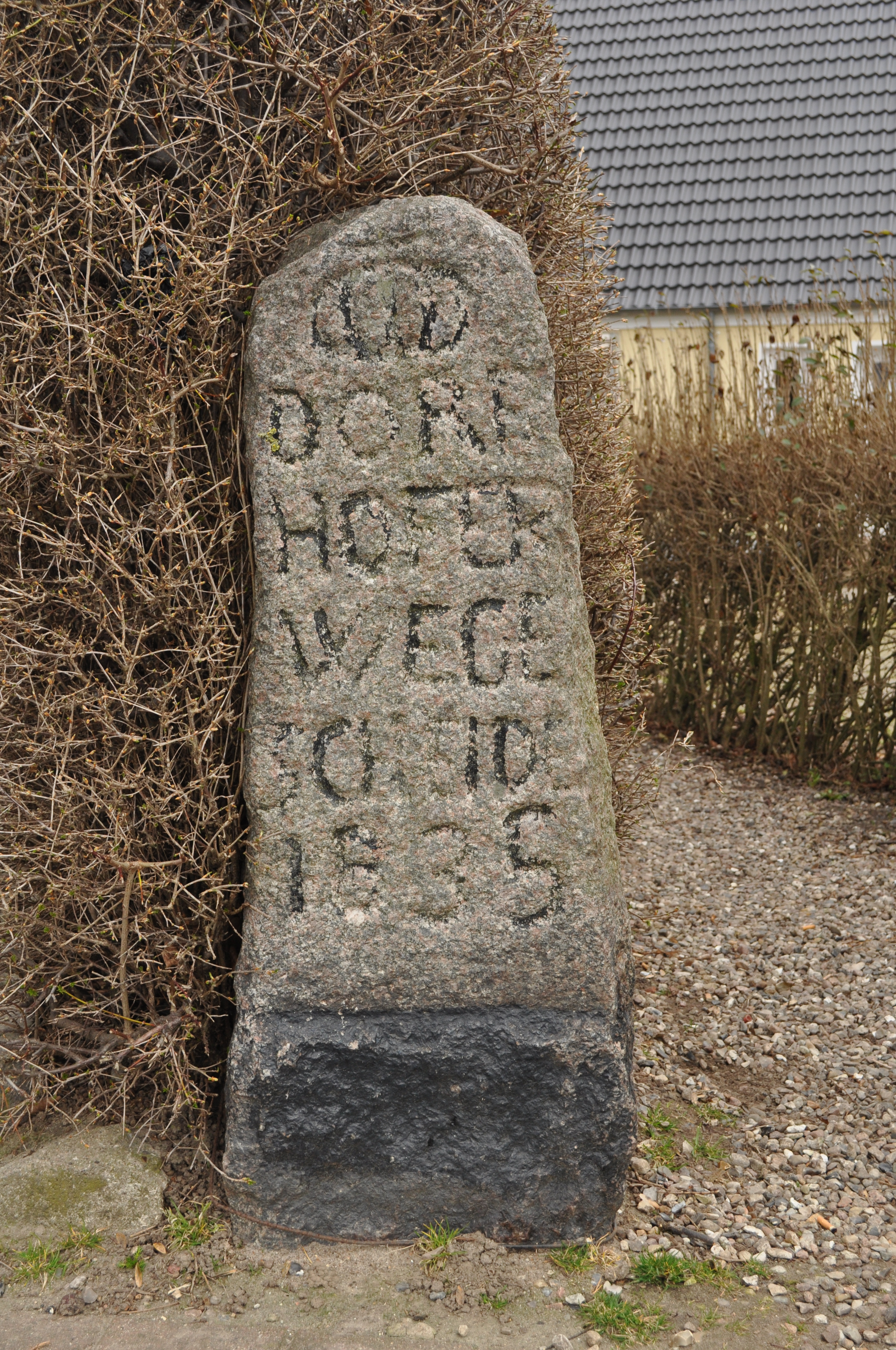 Grenzstein zwischen Karby und Dörphof. Inschrift: DORF / HOF & / WEGE / SCHEIDE / 1835